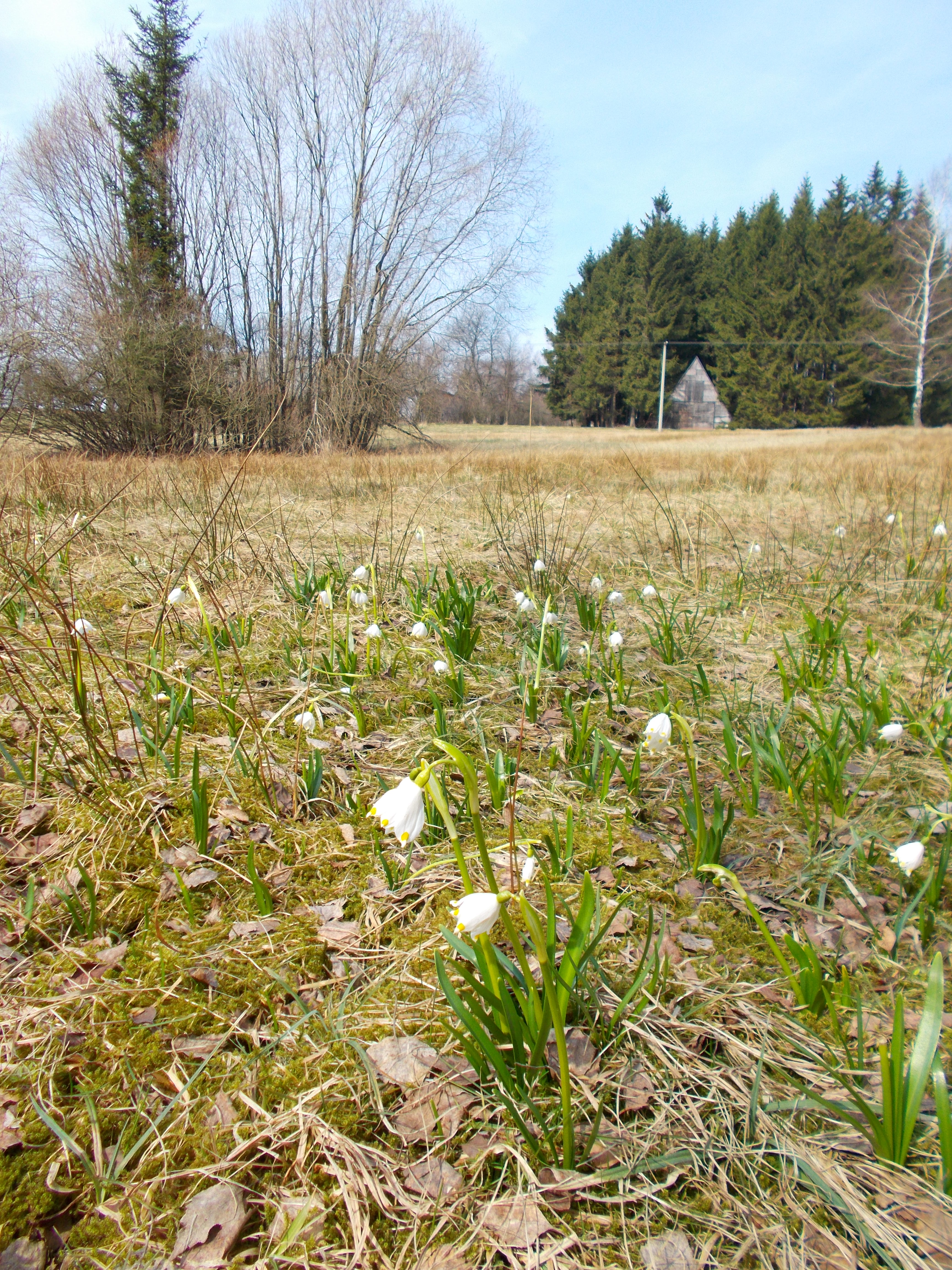 PP Rašelina